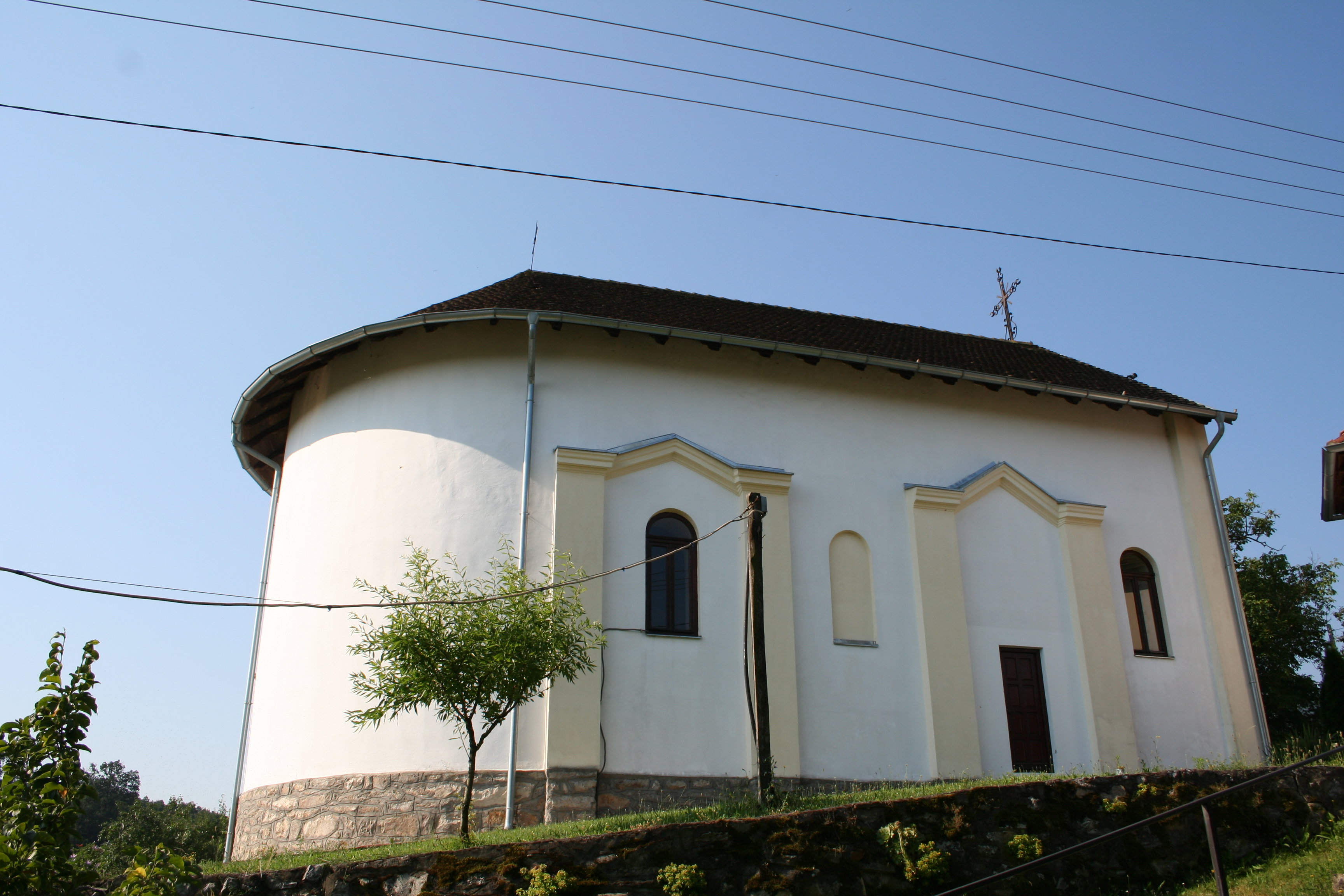 Crkva Svetog Simeona Stolpnika, Miloševac